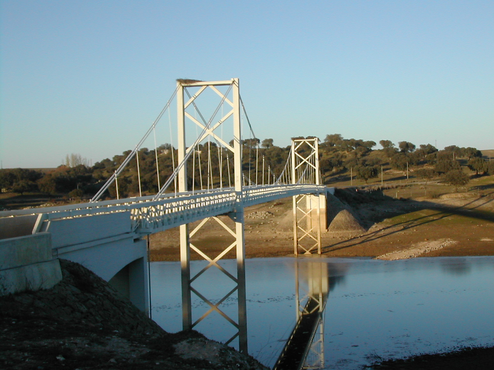 Ponte de Ervedal, Avis, Portugal